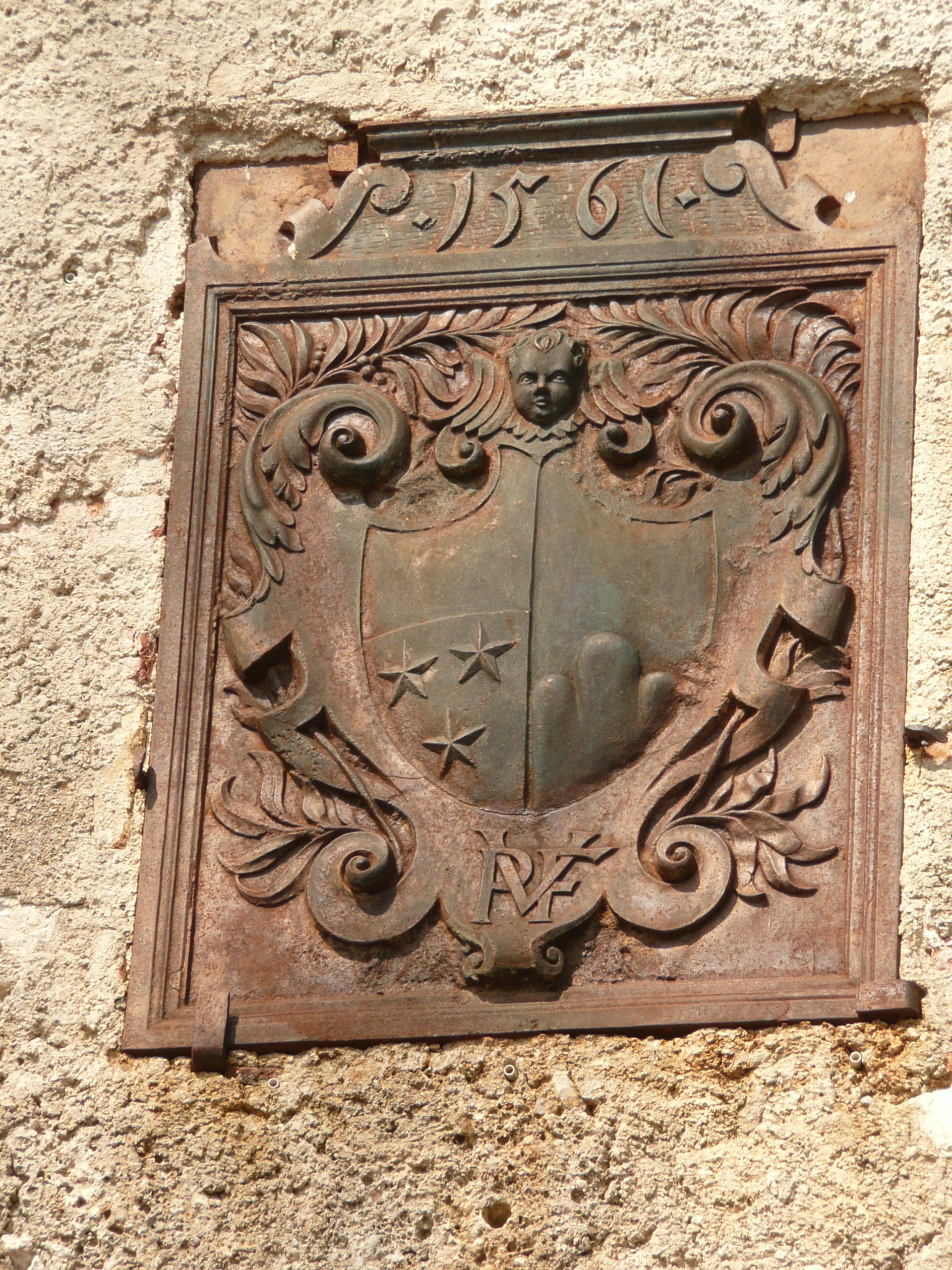 Gusseisernes Wappen von Pankraz von Freyberg über dem alten Tor der Vorburg von Schloss Hohenaschau.